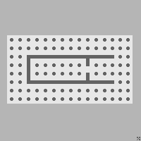 Dipteros